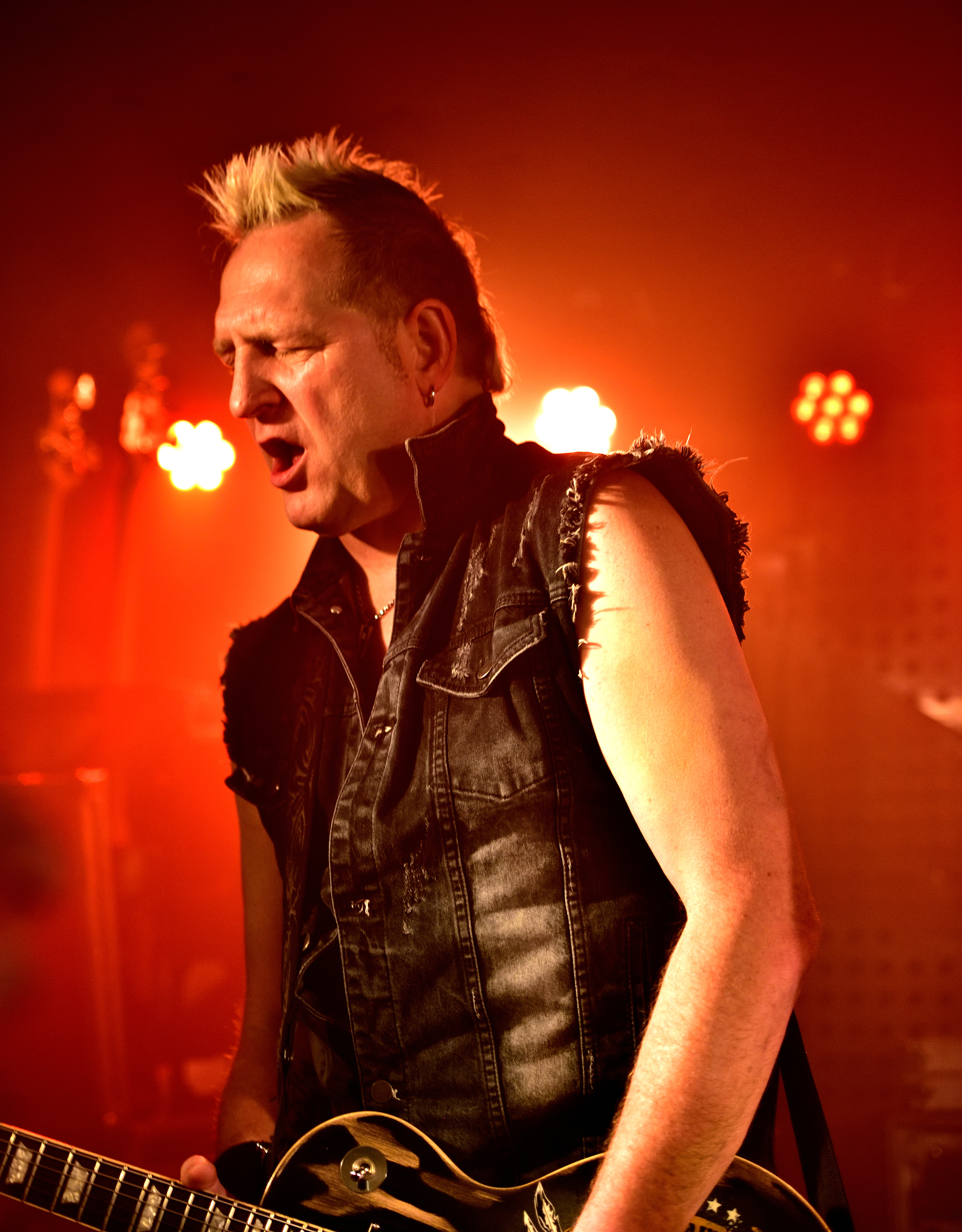 Primal Fear live im Logo Hamburg